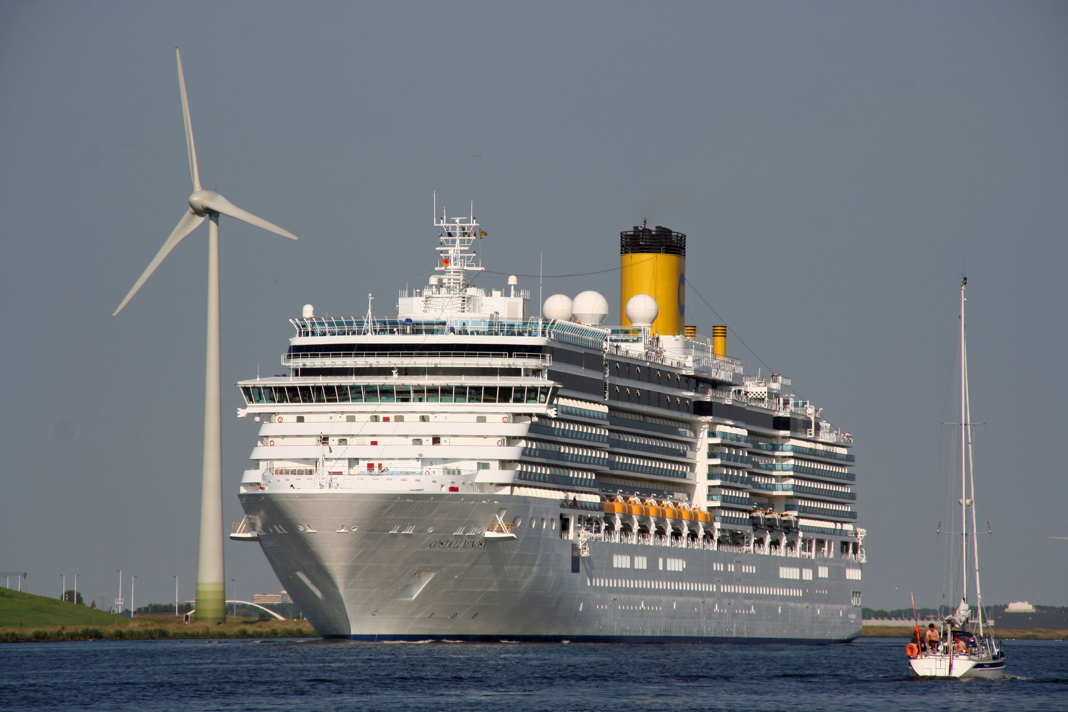 Cruiseschip Costa Luminosa op het Noordzee kanaal ter hoogte van het pontje tussen Buitenhuizen en Assendelft. Op weg voor de cruise "Metropolen van de Oostzee" Dag 1: inschepen in Amsterdam, vertrek 17.00 uur (Werkelijk vertrek 17:30) Dag 2: Op zee Dag 3: Kopenhagen, Denenmarken Dag 4: op zee Dag 5: Stockholm, Zweden Dag 6: Helsinki, Finland Dag 7: Sint-Petersburg, Rusland Dag 8: Sint Petersburg, Rusland Dag 9: Tallinn, Estland Dag 10: op zee Dag 11: op zee Dag 12: Amsterdam, aankomst 09.00 uur.